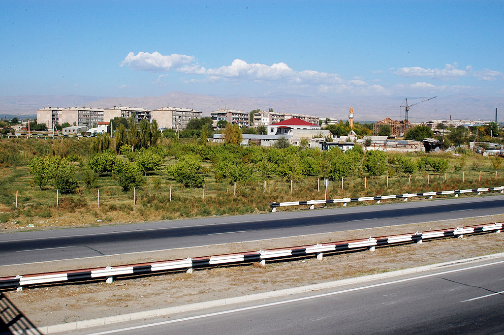 sur l'autoroute M2, Erevan-Artashat-Goris-Stepanakert